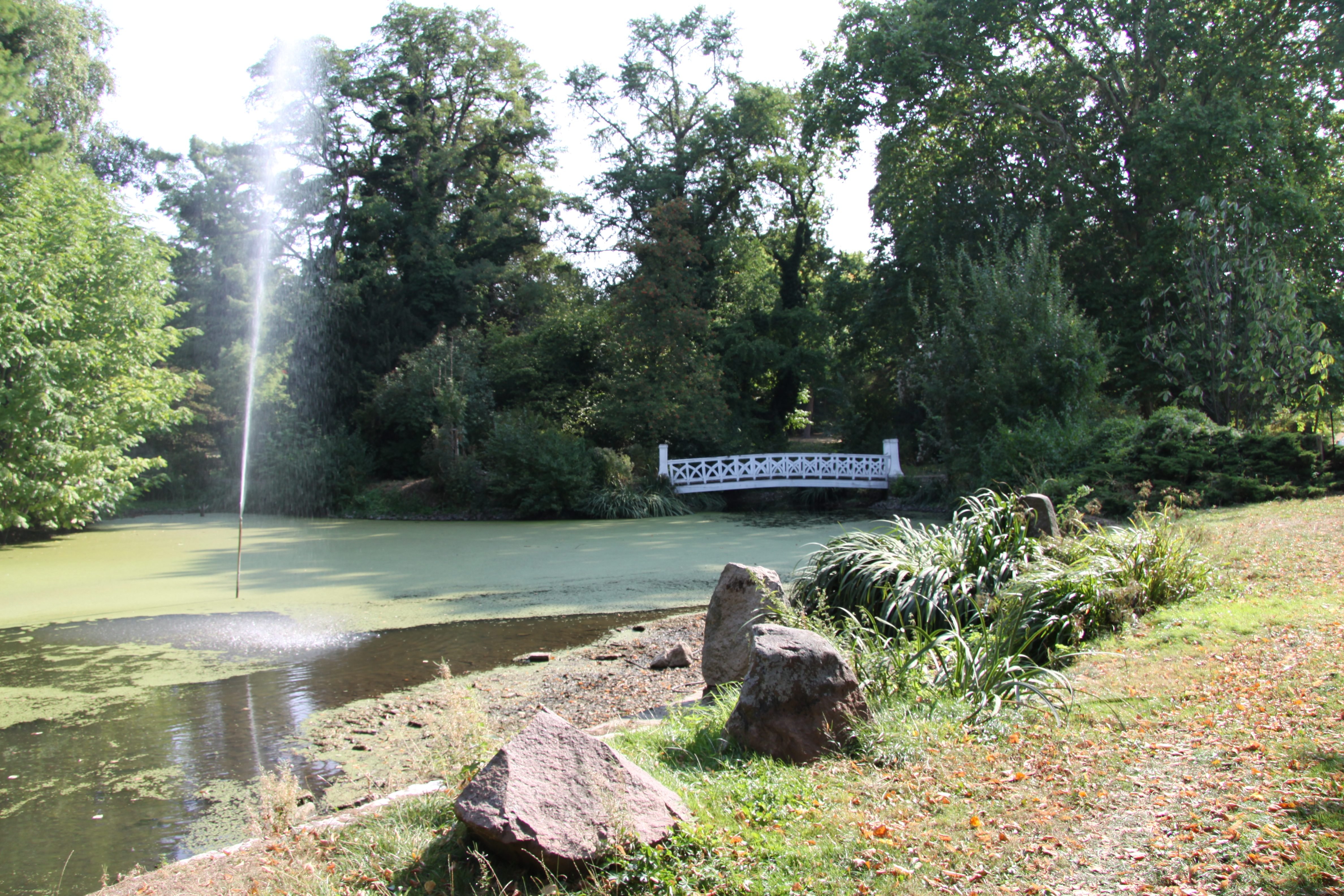 Teich im Rittergutspark Destedt (Im Hintergrund Brücke bzw. Eingang in den Park)